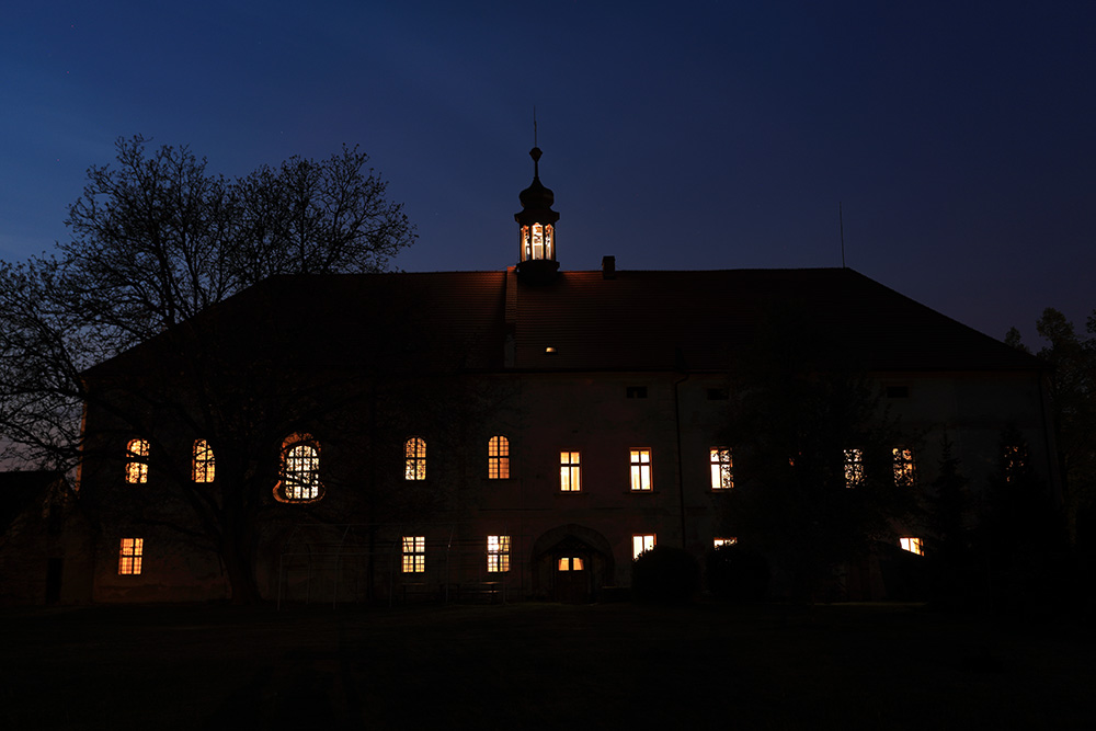 Slavnostní noční nasvícení sanktusníku, Noc kostelů 2019